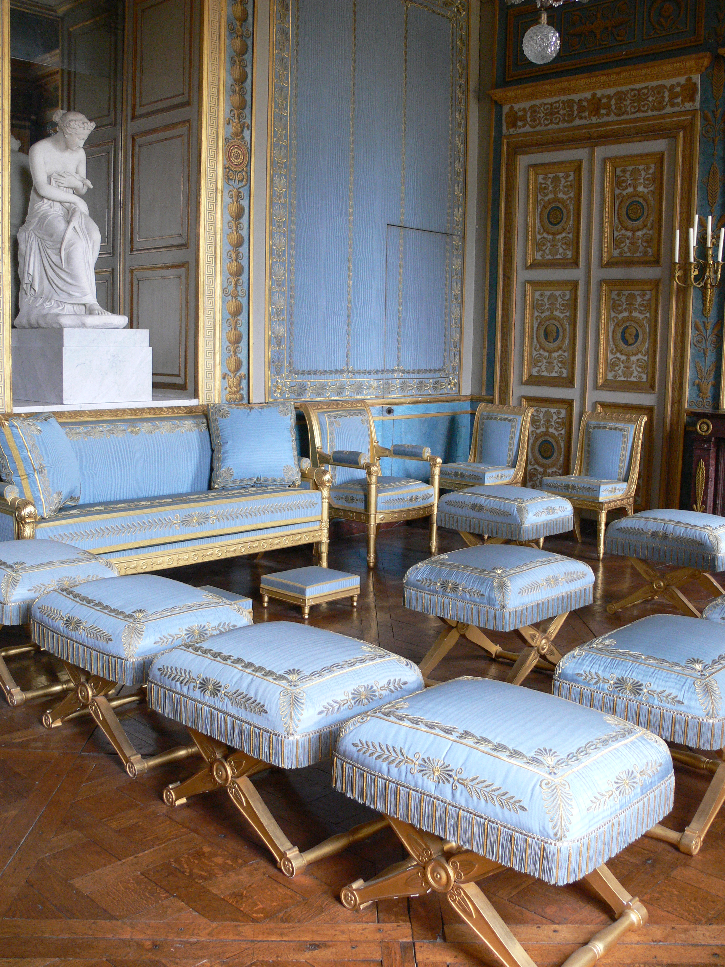 Compiègne, France: Château de Compiègne Les appartements historiques Salon bleu Sculpture: L'Innocence réchauffant un serpent dans son sein, de Charles-Antoine Callamard, 1806, marbre Charles Antoine Callamard (1776–1821) DescriptionFrench sculptorDate of birth/death17761821Location of birth/deathParisParisAuthority control : Q539634 VIAF: 121597172 ULAN: 500016097 GND: 129636290 SUDOC: 181622149 BNF: 14800383f